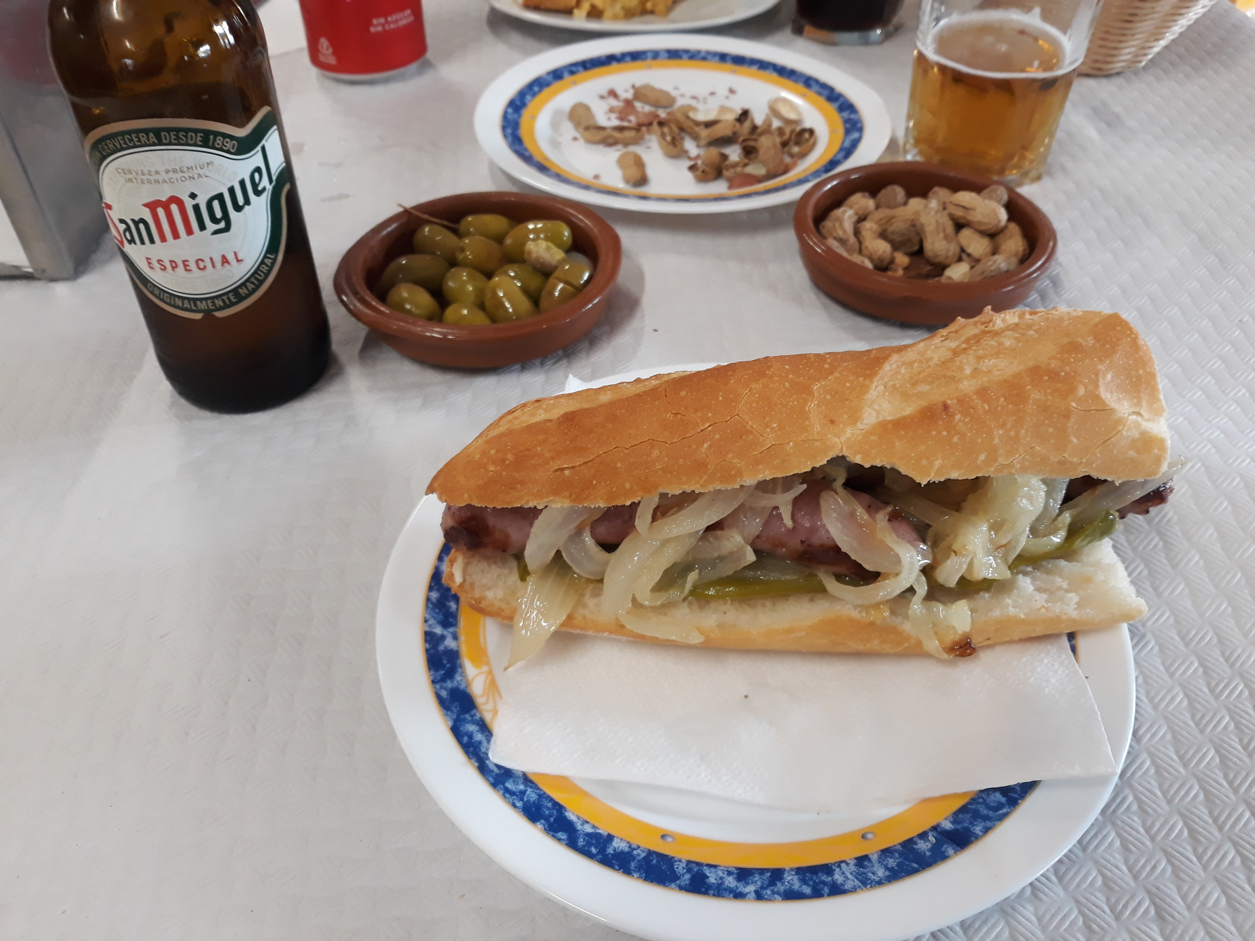 Esmorzar a l'Ateneu